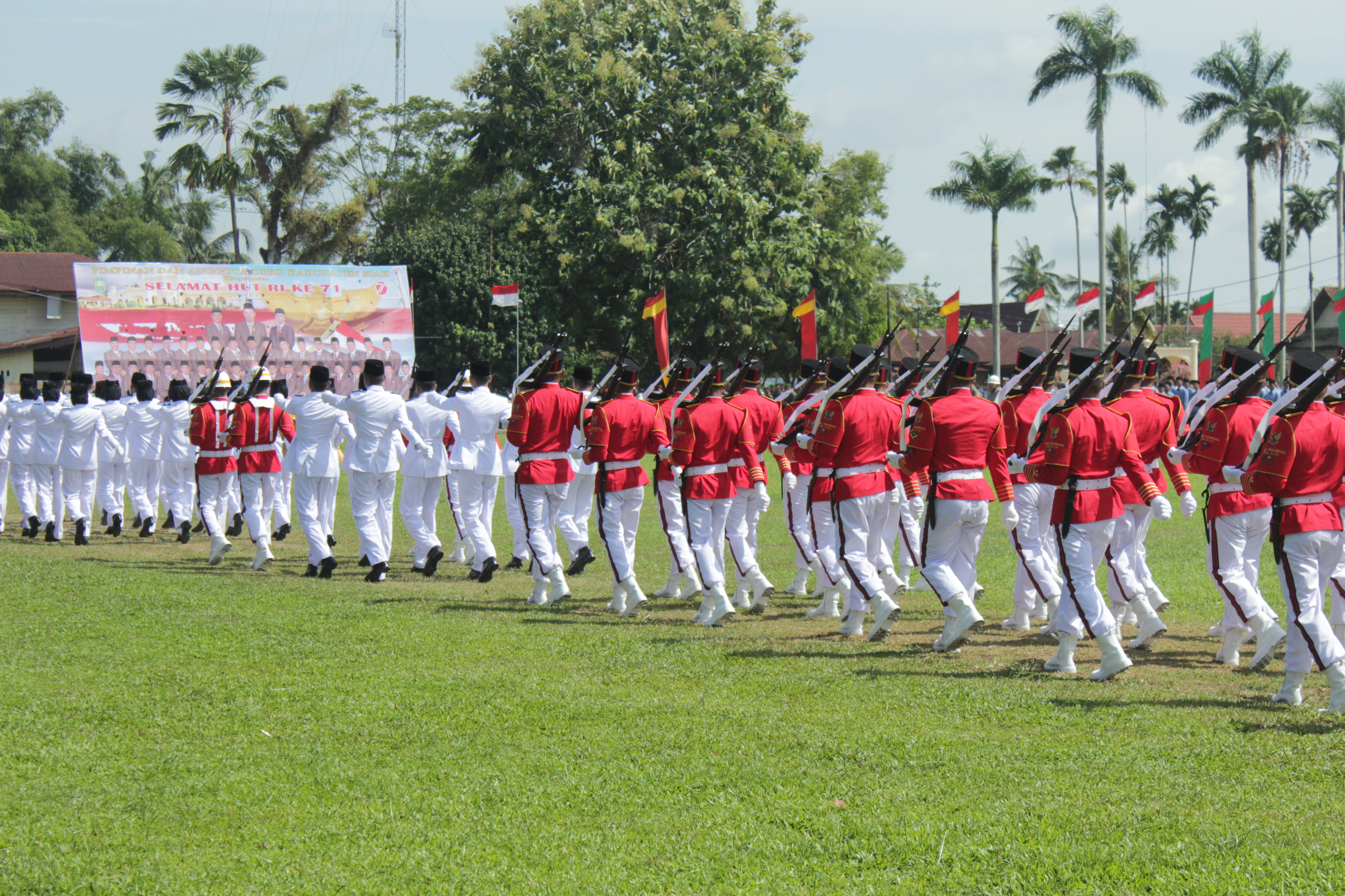 Paskibra mengambil tempat